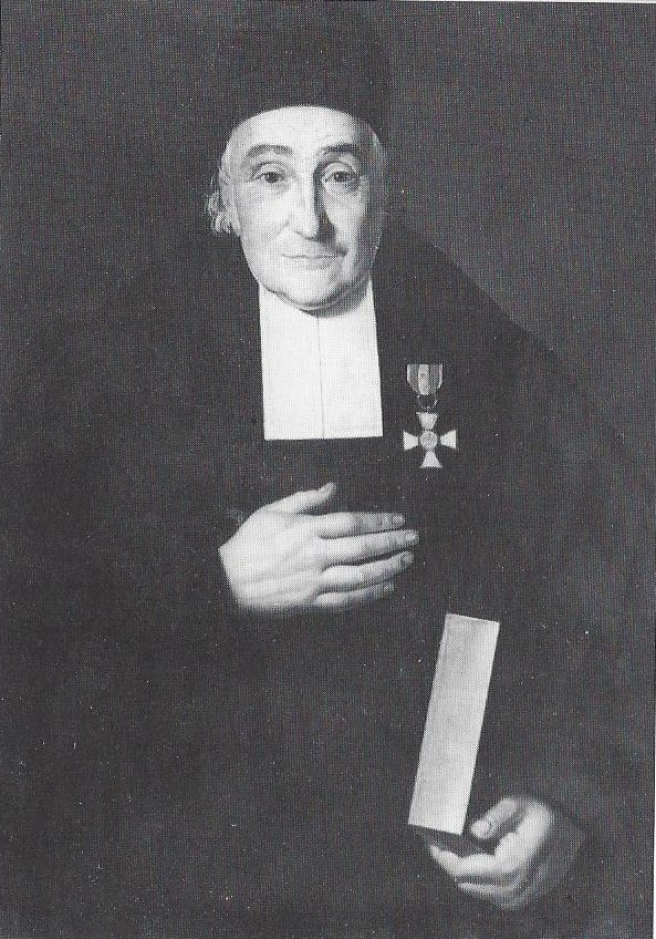 Fotografie ein Ölgemäldes von Heinrich Balthasar Wagnitz